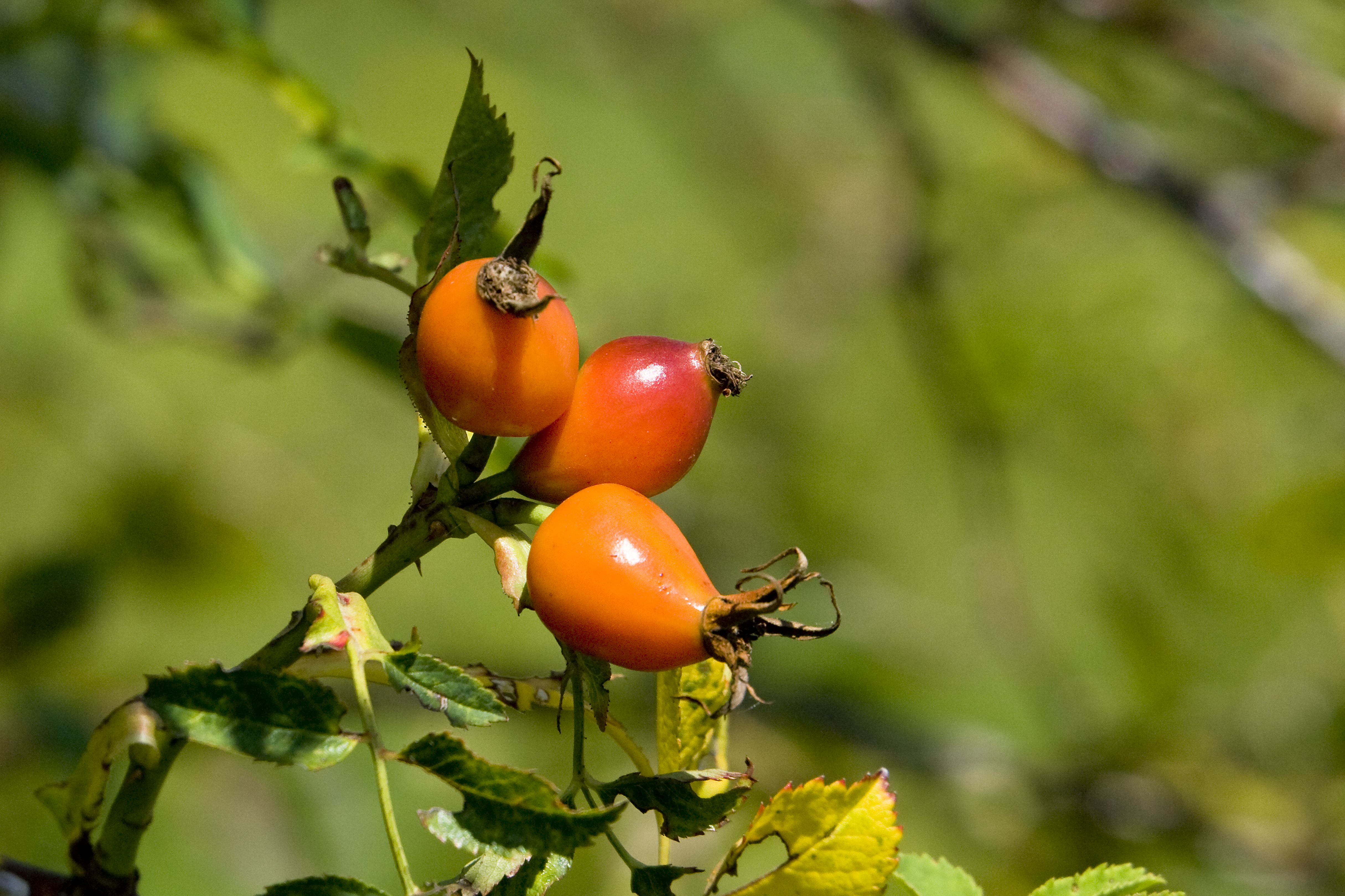 Hagebutte